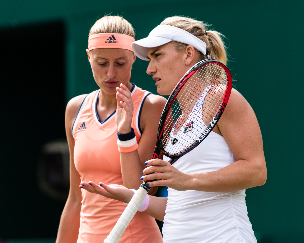 Timea Babos & Kiki Mladenovic